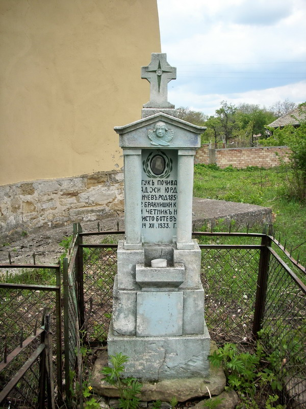 Село Бракница, община Попово - паметника на жаджи Юрдан Комитата в двора на църквата